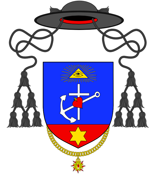 Osobní znak kanovníka Martina Davídka (člen litoměřické katedrální kapituly, biskupský vikář). Blason: Štít s patou. V hlavním modrém poli stříbrný latinský kříž přeložený šikmo stříbrnou kotvou a kosmo planoucím srdcem, nad křížem zlaté zářící Boží oko. V červené patě štítu zlatá hvězda. Pod patou štítu kanovnické signum na řetězu. Vše převýšeno černým kloboukem se šesti střapci.